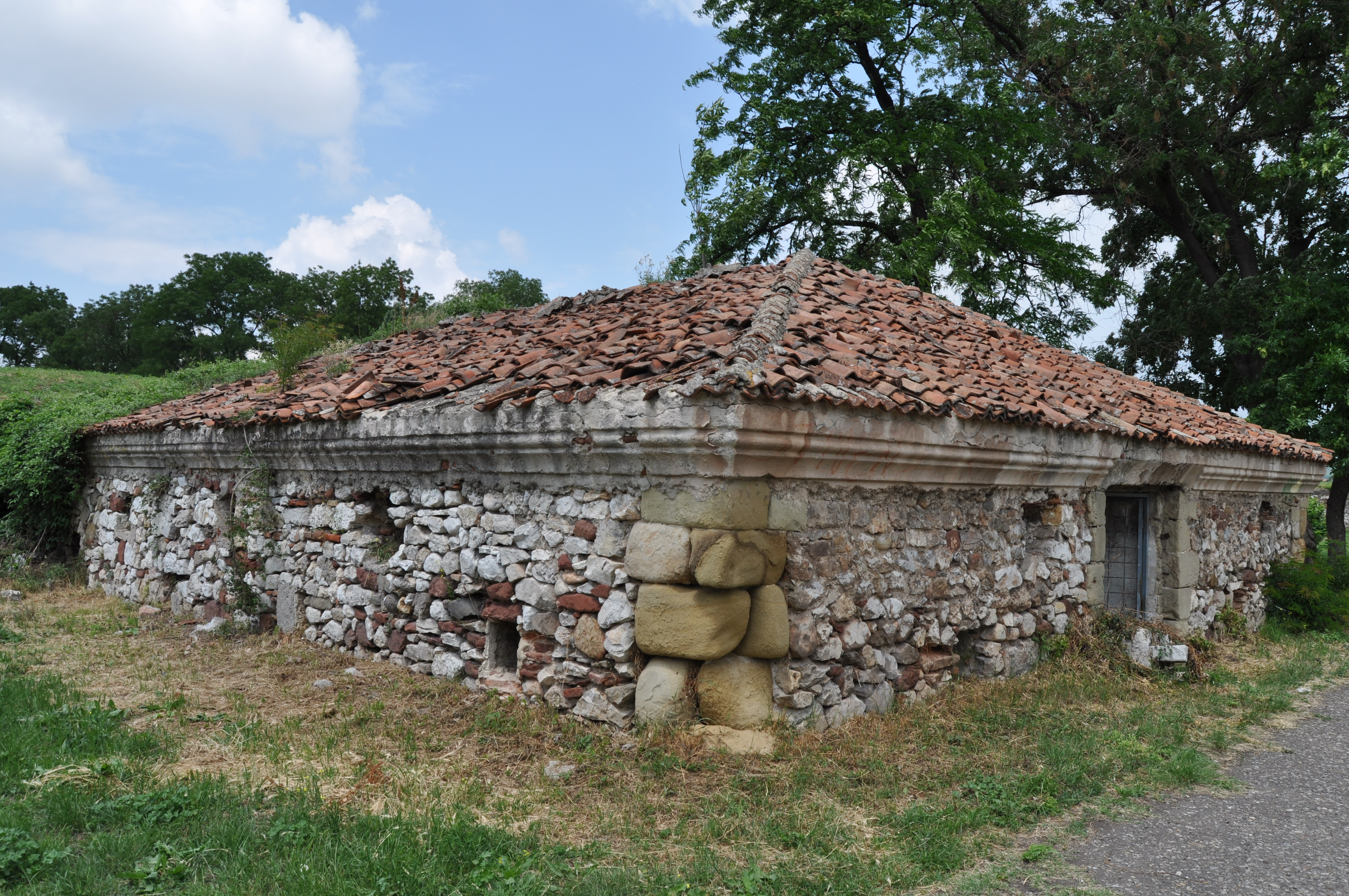 Prachovna na pevnosti v Niši